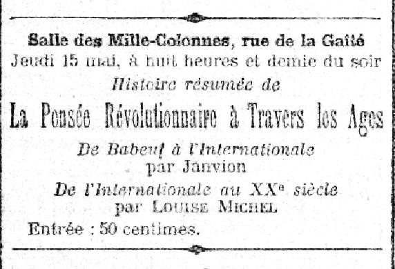 Annonce d'une réunion rue de la Gaité